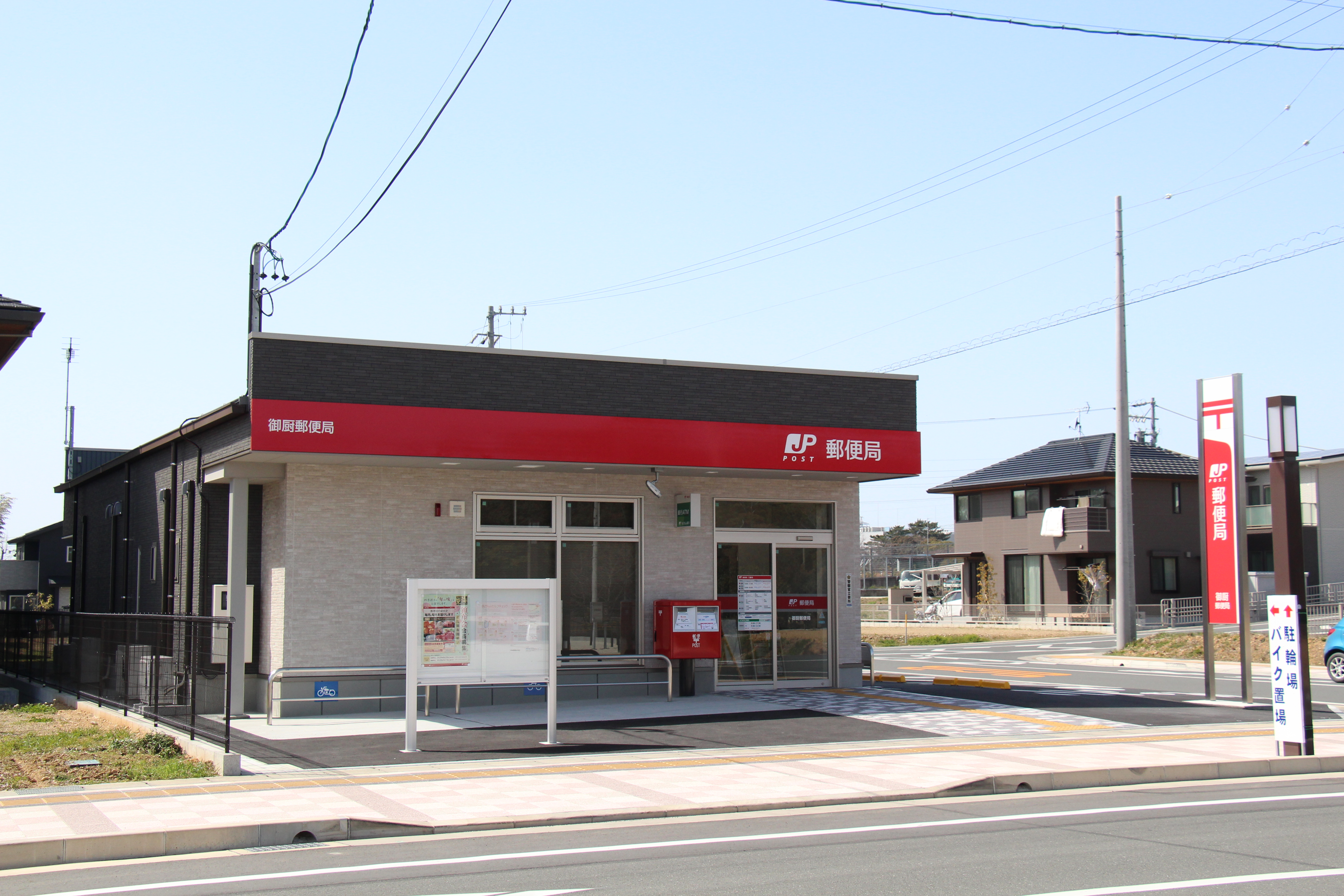 2020年3月16日の移転後の御厨郵便局の外観を東側から撮影した。 住所 : 静岡県磐田市鎌田2200-1-21-15